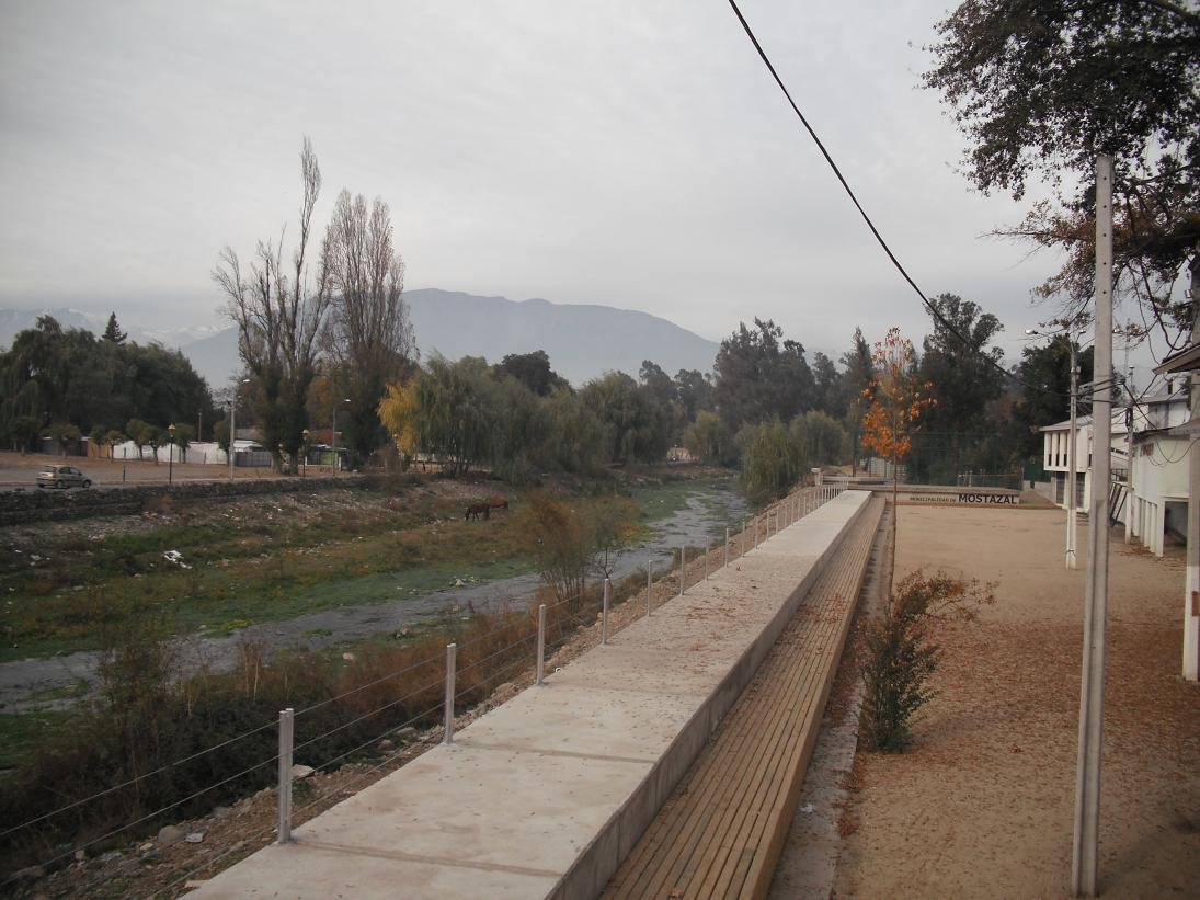 San Francisco de Mostazal, a la altura de la Municipalidad- por calle Independencia